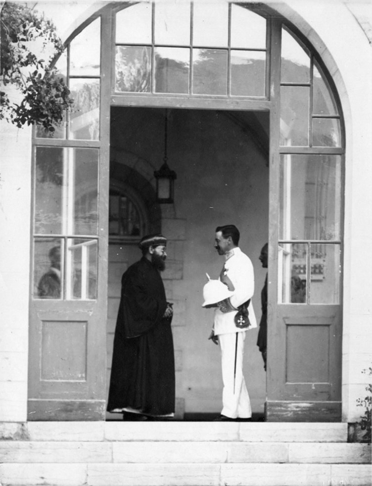 הרברט סמואל מקבל את פני החכם באשי הרב נסים יהודה דנון, בפתח בית המושל, 1920.